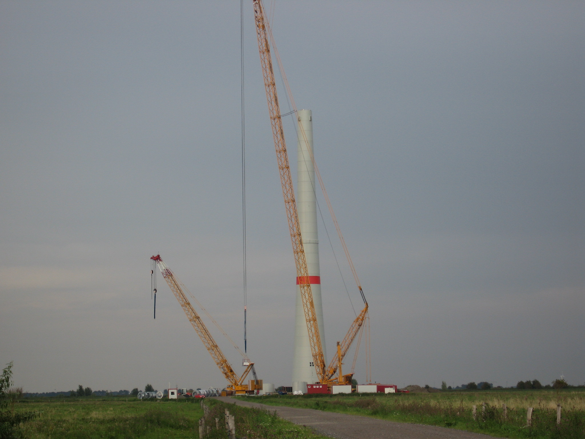 Enercon E 126 im Bau in Emden/Knock am 19.08.2007